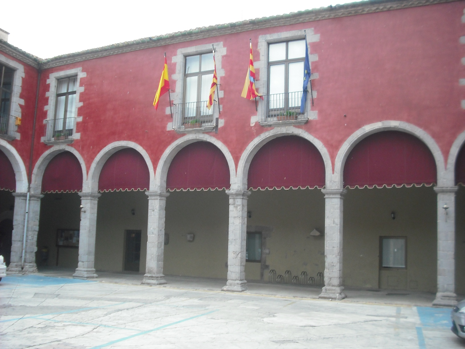 Ajuntament de Castelló d'Empúries.